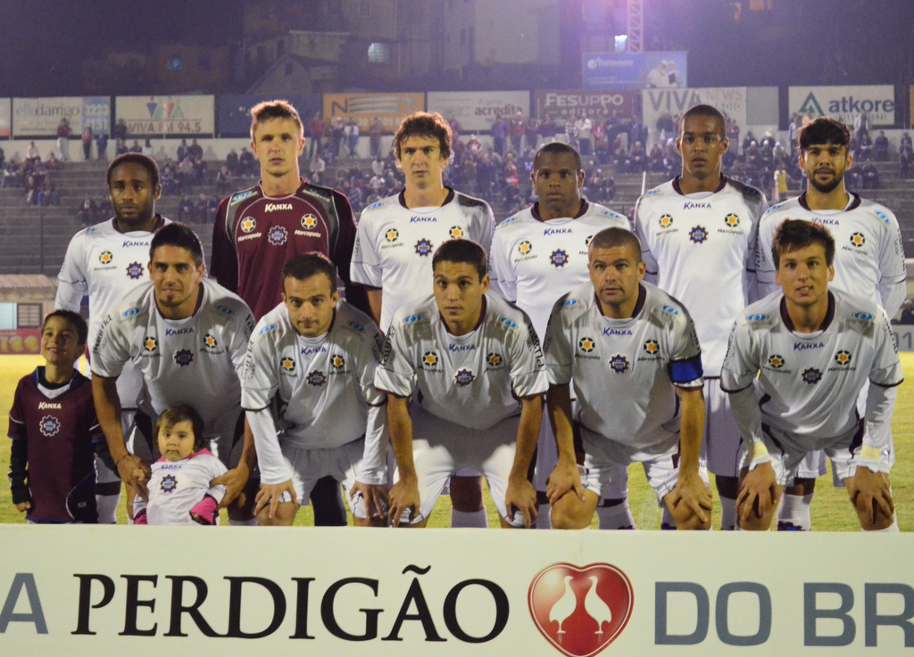 Fotos do jogo entre S.E.R. Caxias X Resende (RJ) válido pela Copa do Brasil 2013.